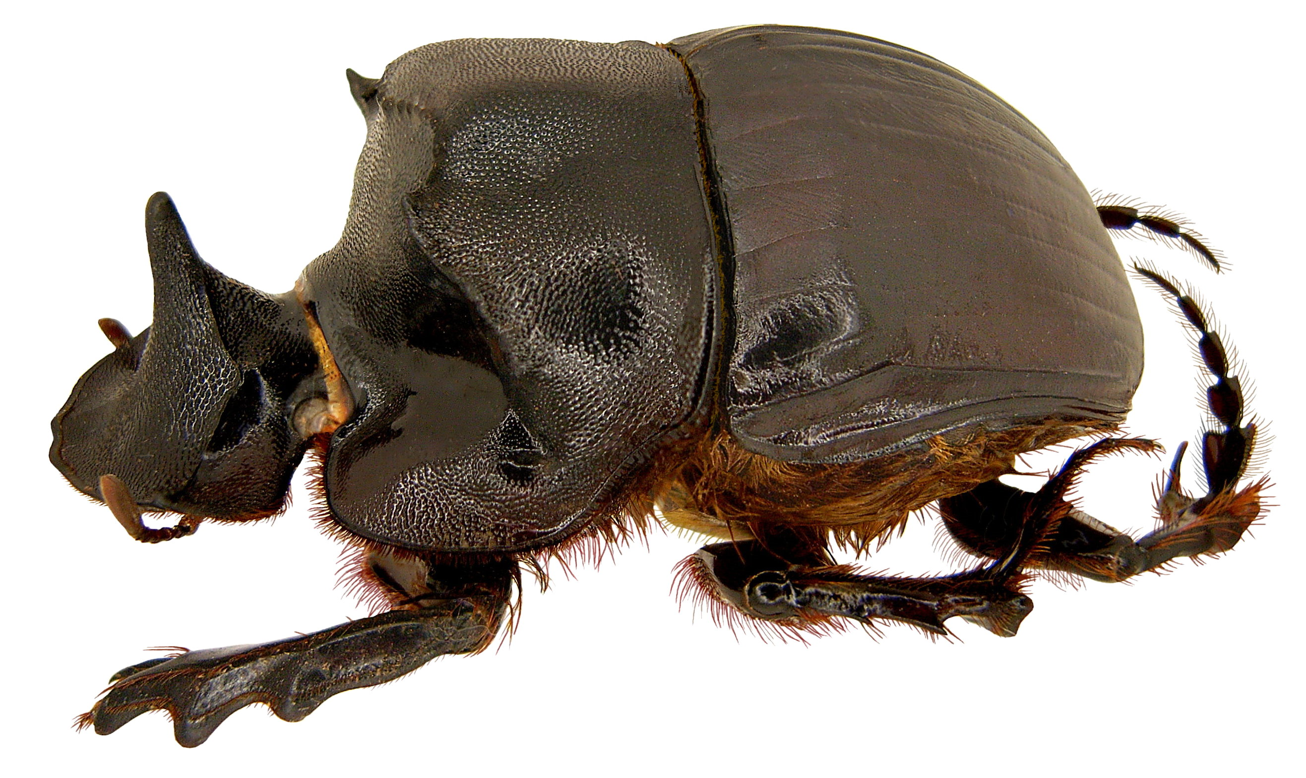 Familie: Scarabaeidae Grösse: 33-47 mm Fundort: Kenia, Tsavo National Park leg.det. U.Schmidt, 1991 Foto: U.Schmidt, 2009